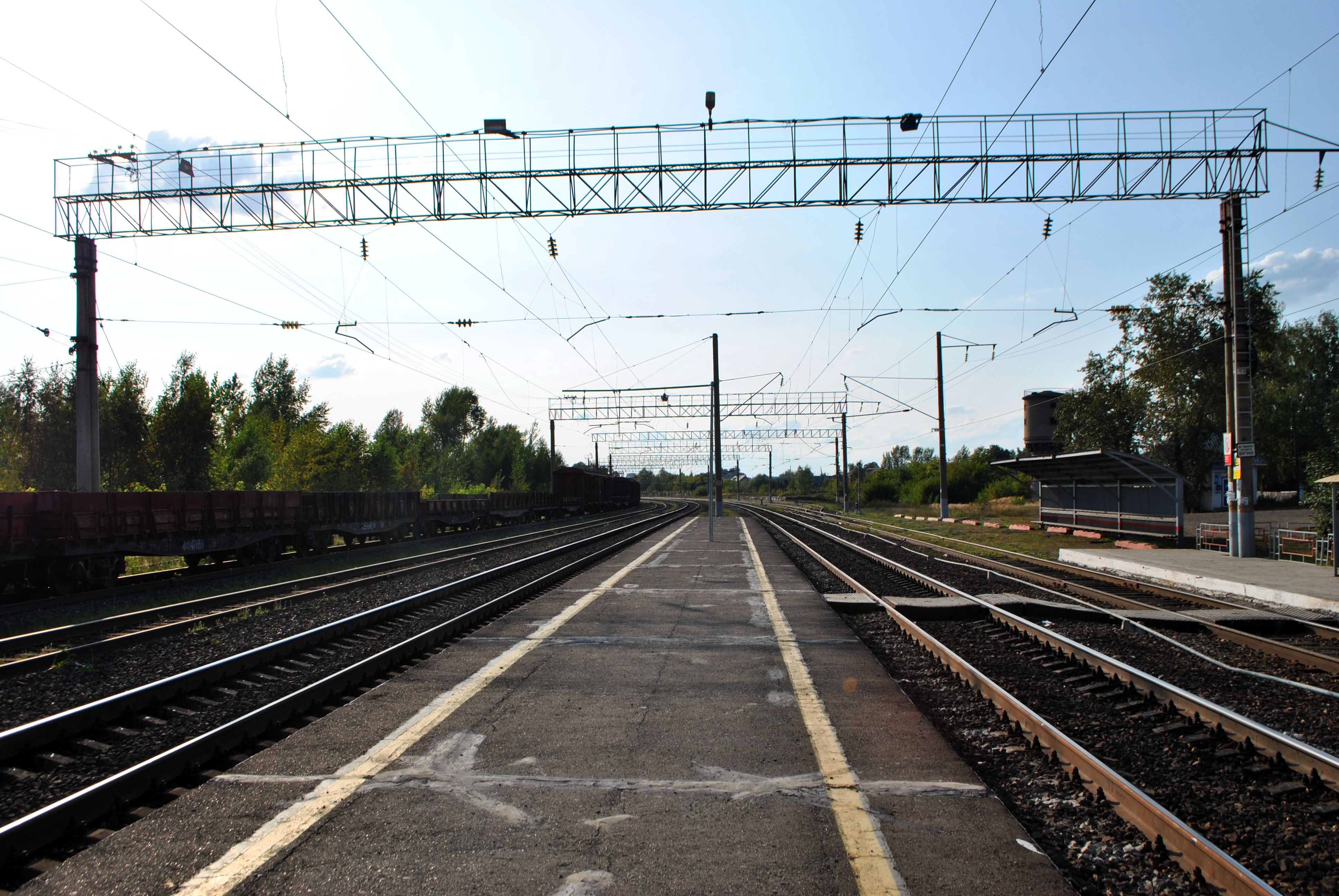 Станция Камбарка в нечётном направлении